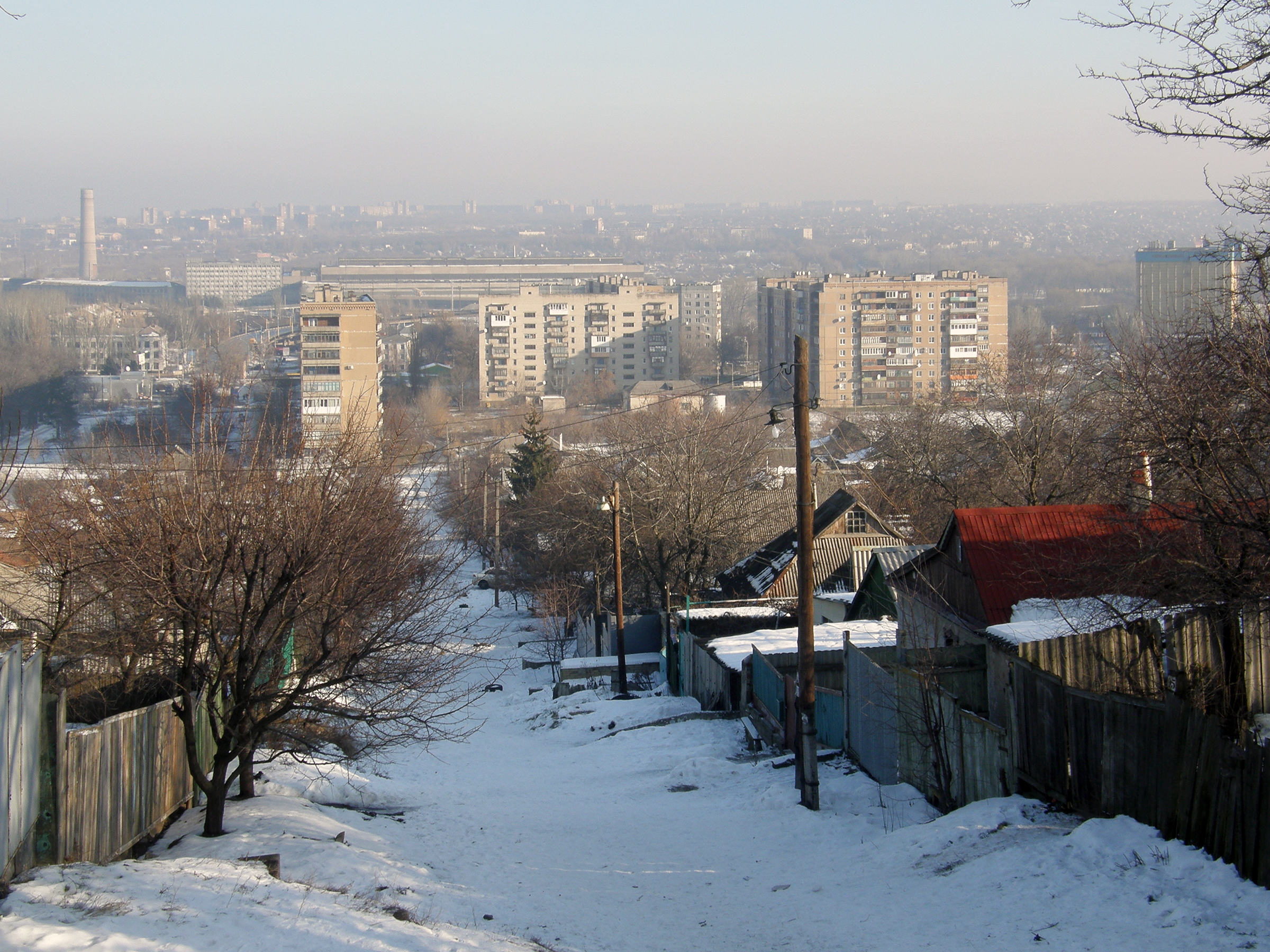 посёлок Октябрьский, Старый город